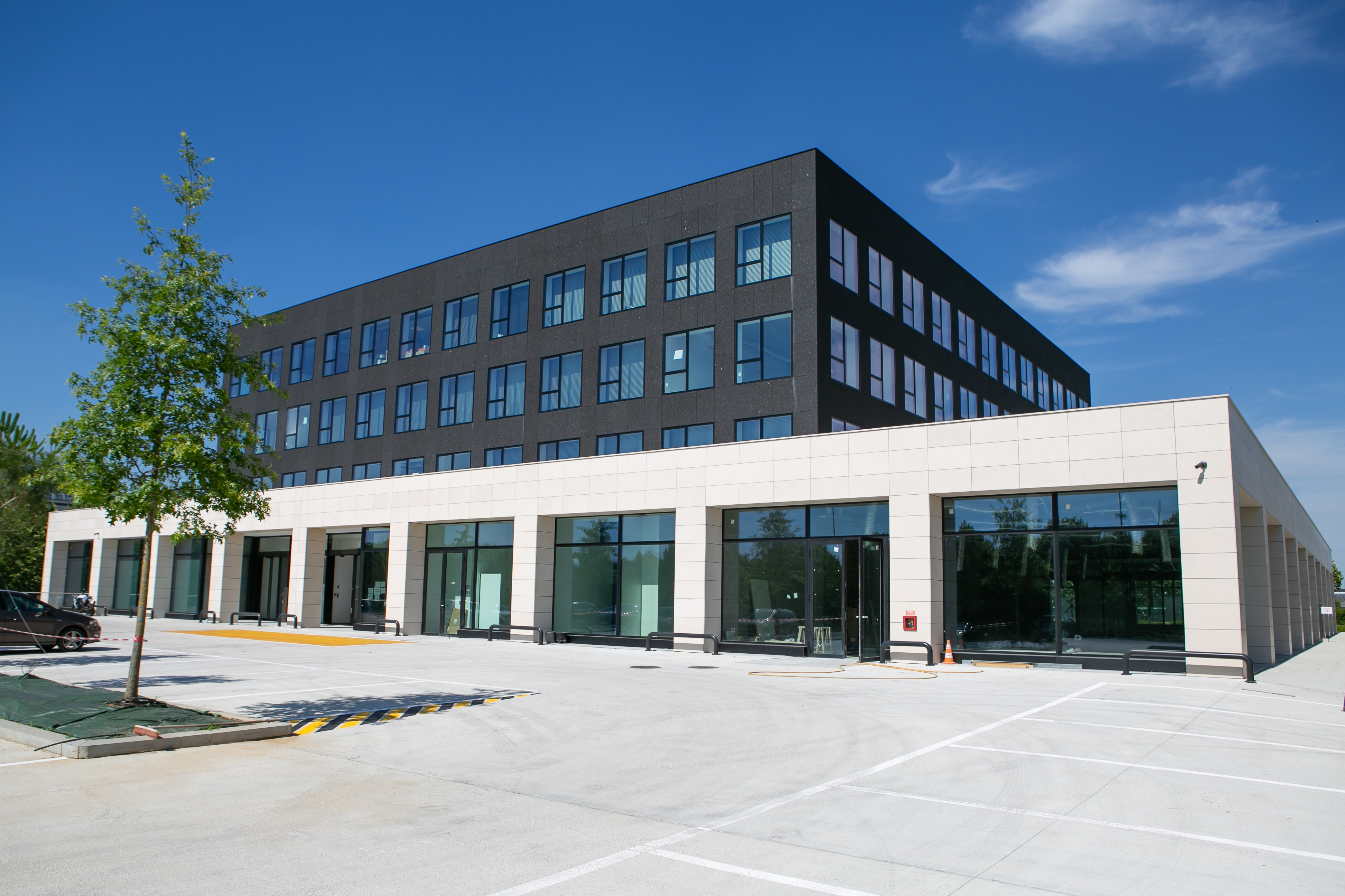 Vue du Pôle médical de Carré Sénart / Lieusaint / Seine-et-Marne / France